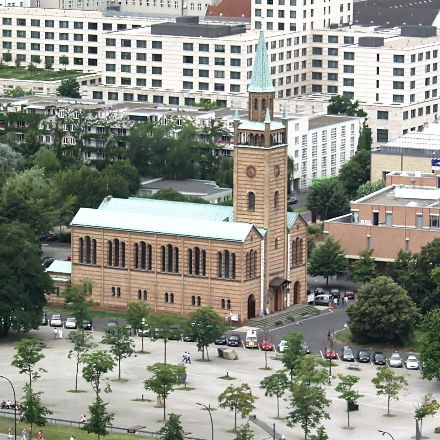 St. Matthäuskirche (Berlin-Tiergarten) von oben